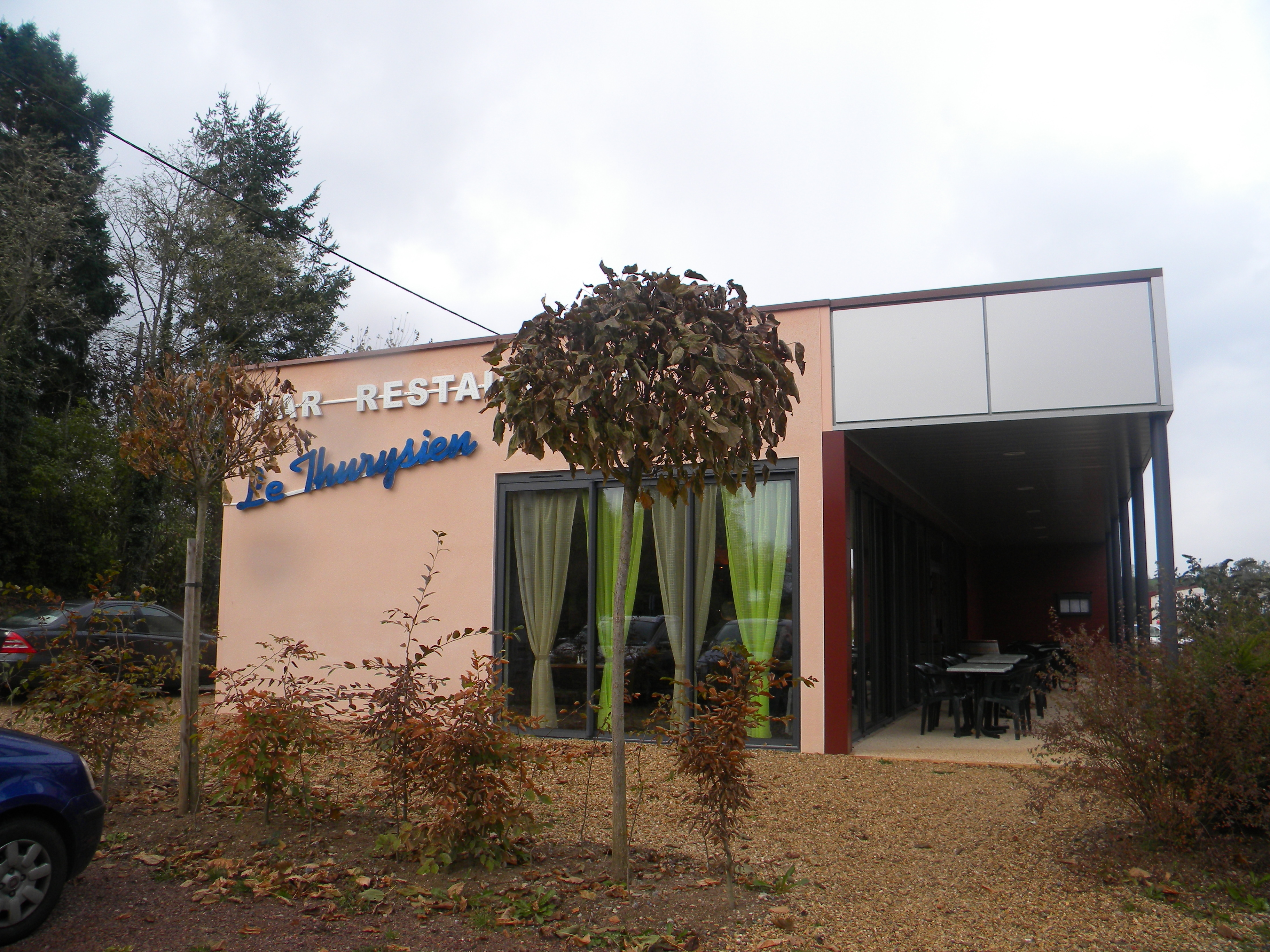 Restoracio